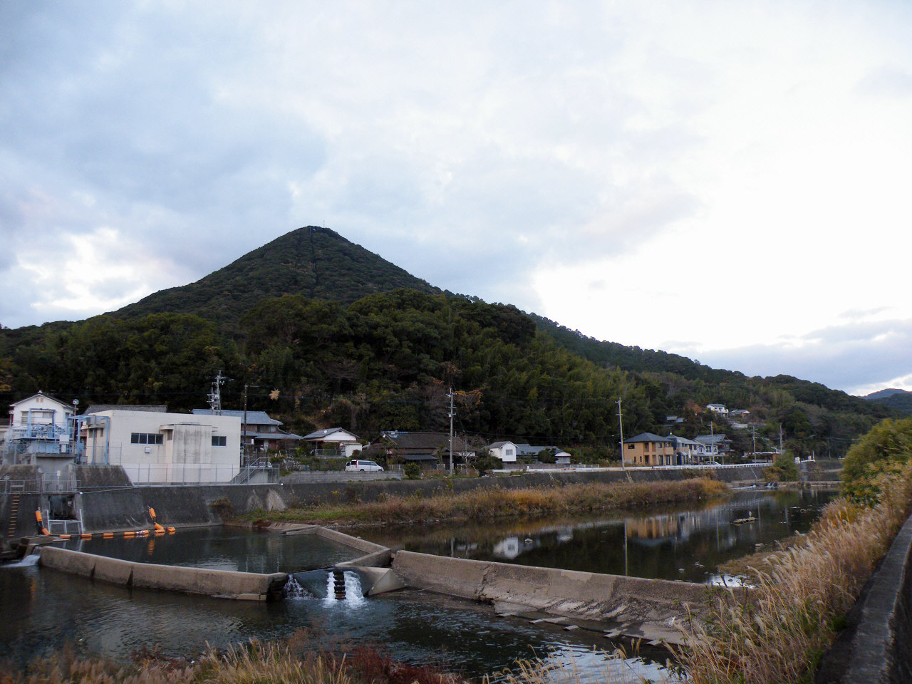 相浦川と愛宕山（佐世保市相浦町）